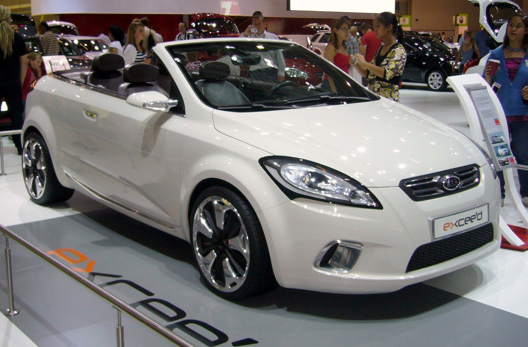 Kia excee'd Concept